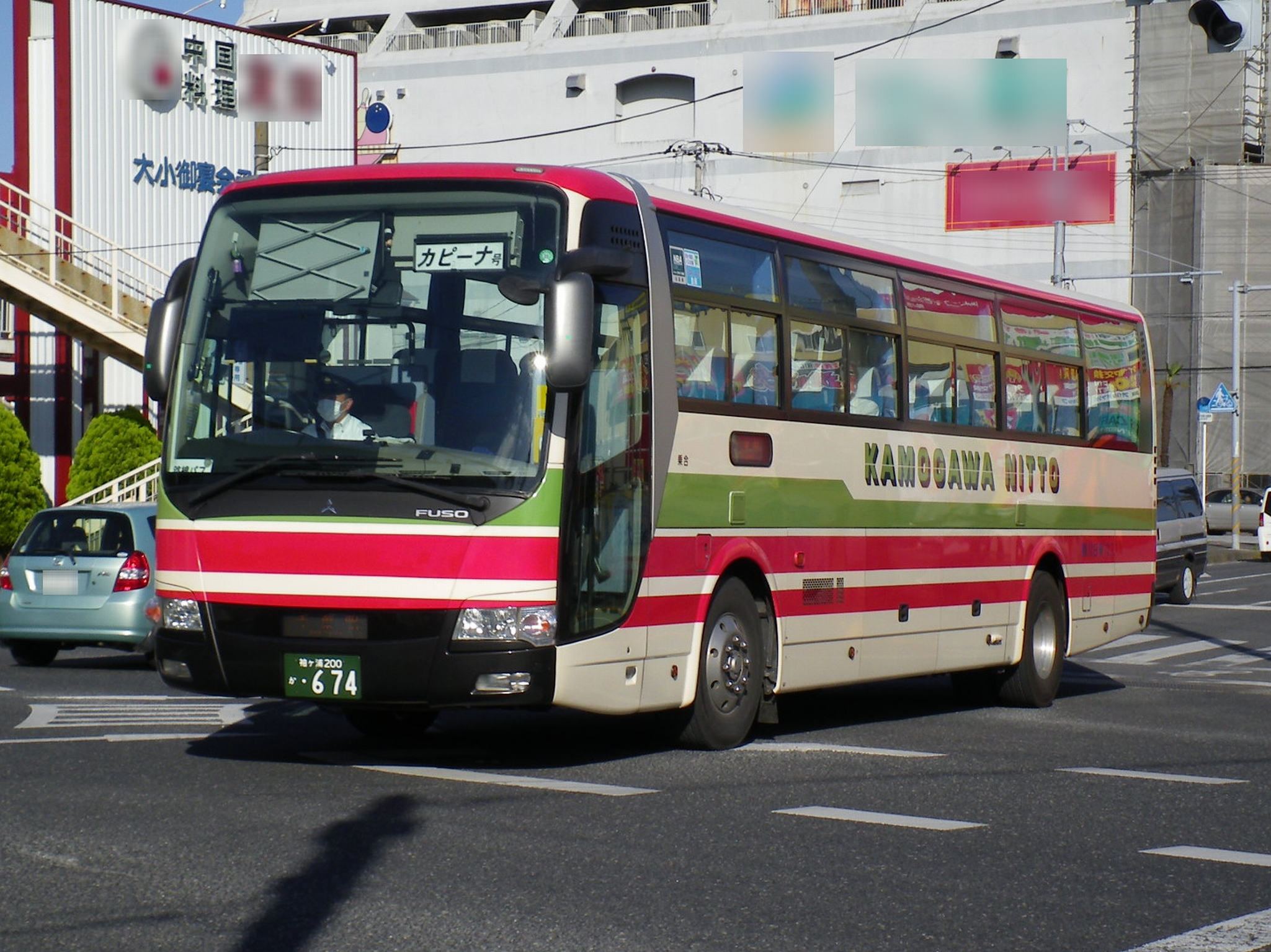 三菱ふそう・エアロエース 袖ケ浦200か674 千葉県鴨川市・横渚交差点にて投稿者本人が撮影。